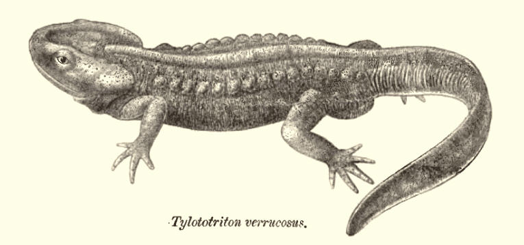 Himalayan salamander, Tylotriton verrucosus